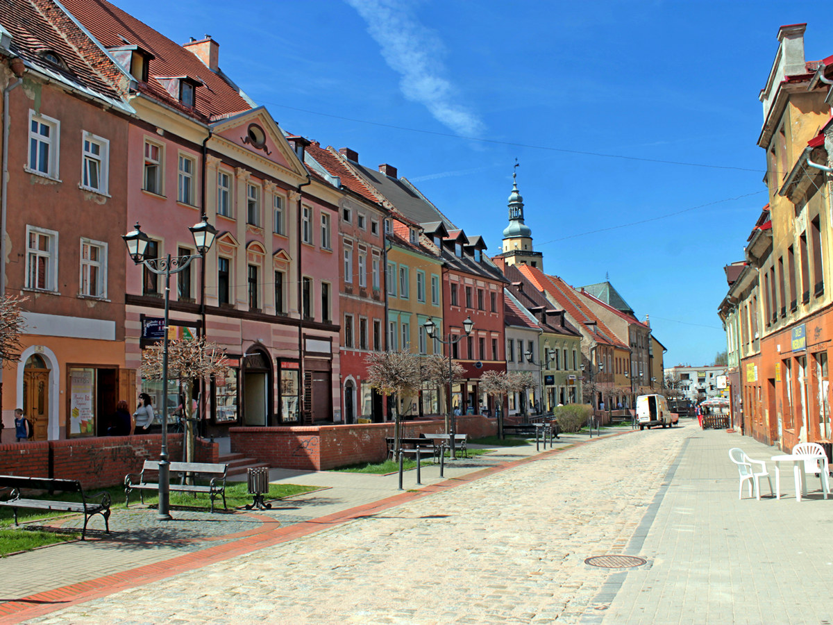 Główna ulica Starego Miasta w Kowarach